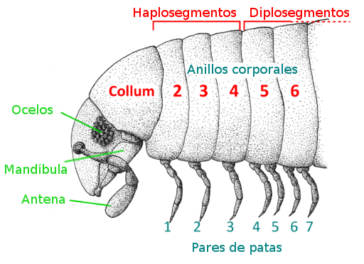 Cabeza y segmentos anteriores de un diplópodo.